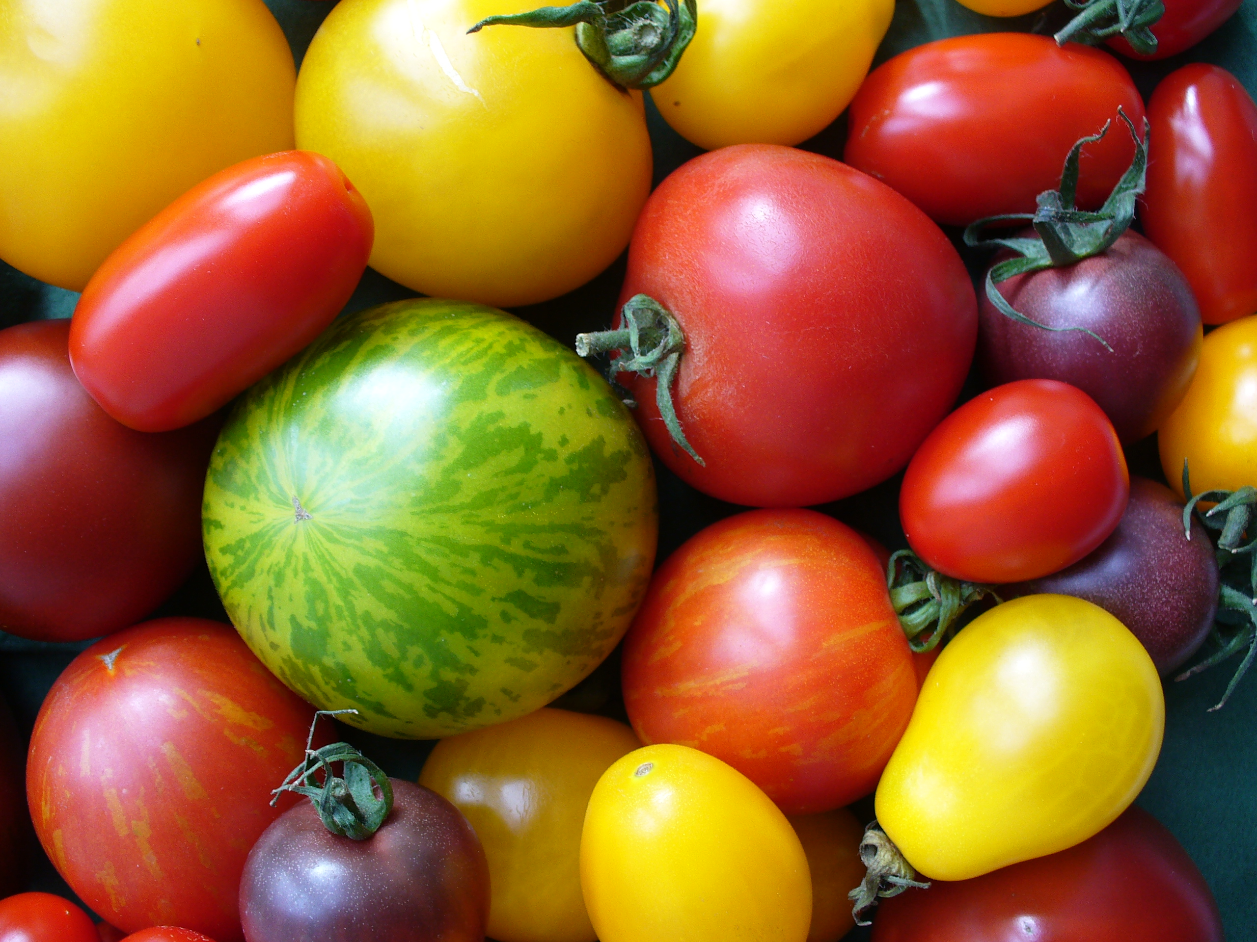 Zusammenstellung unterschiedlicher Tomatensorten